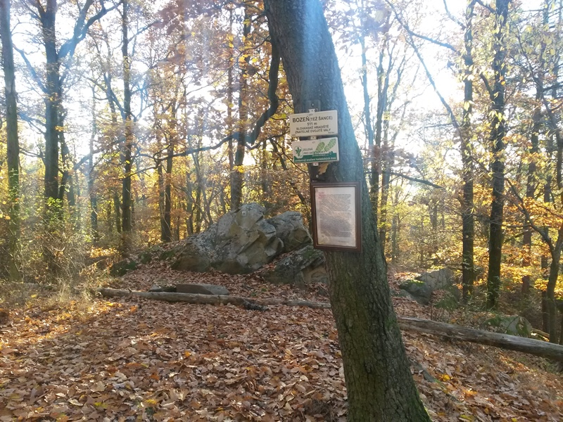 Akropole hradiště Bozeň na vrchu Šance 511 m.